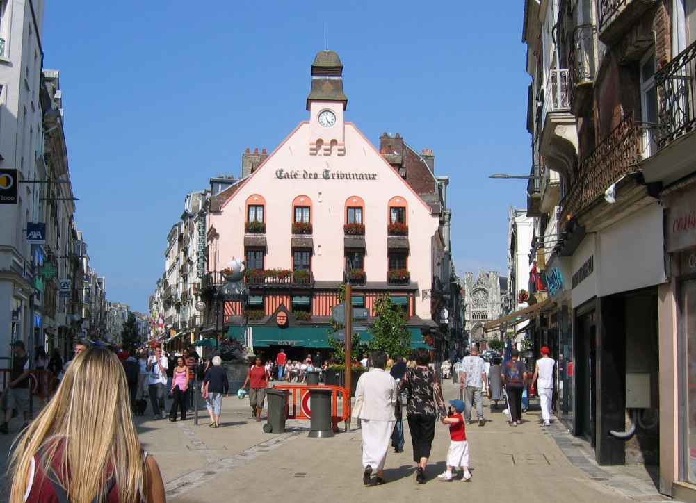 Grande Rue à Dieppe et Café des Tribunaux, place du Puits-Salé, juillet 2004